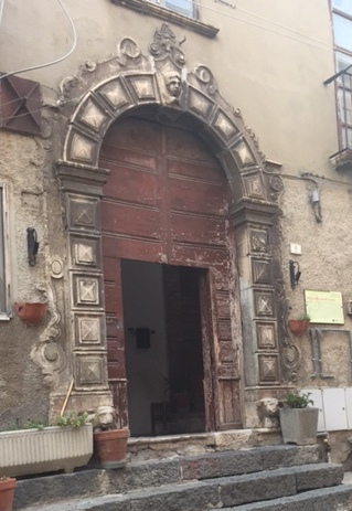 Portale Ferretti, detto anche Della caserma vecchia